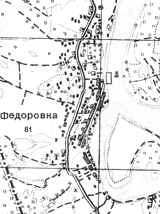 Топографическая карта Ленинградской области, квадрат О-35-21-В-б (Фитинка), деревня Фёдоровка